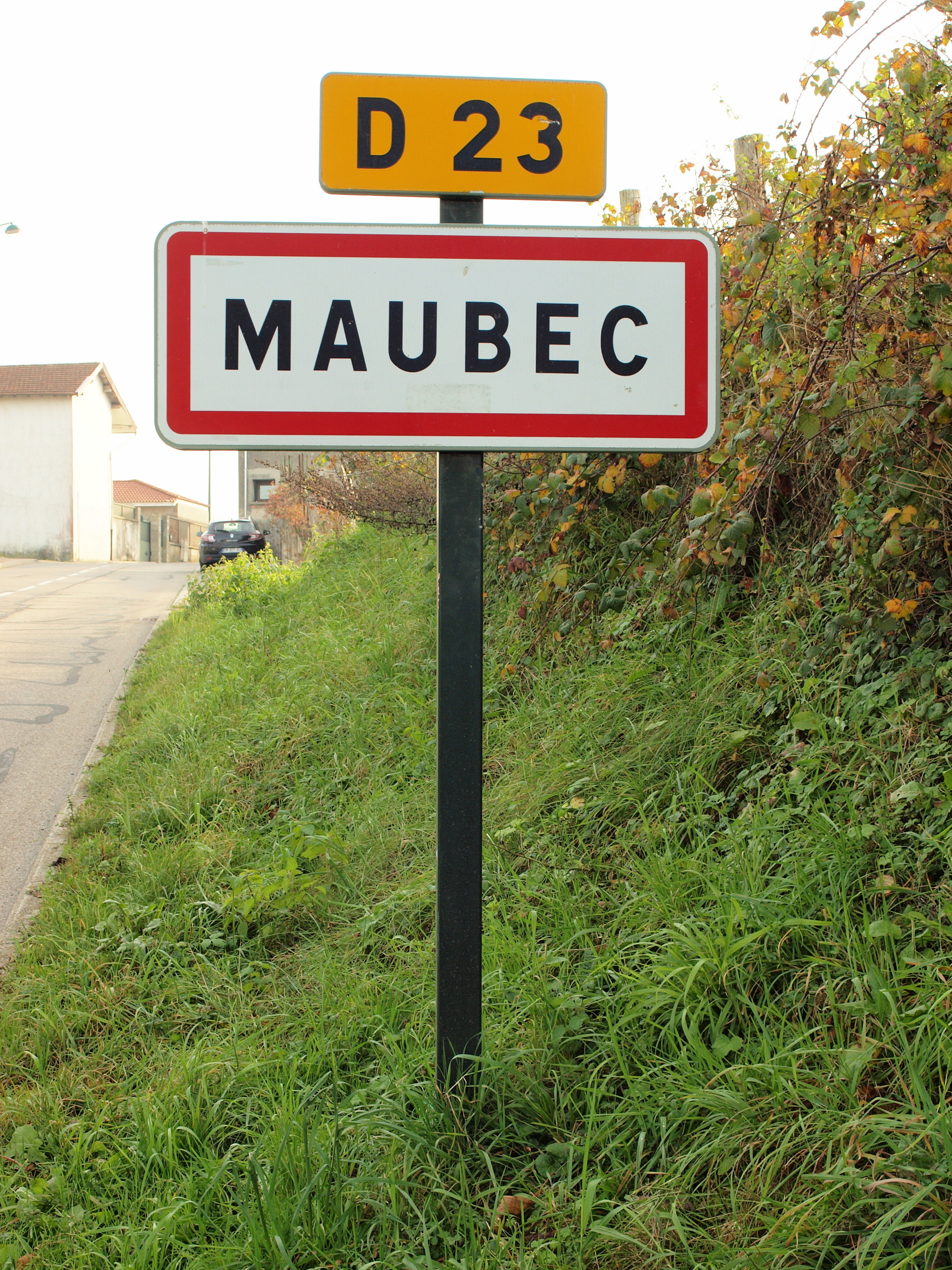 Maubec (Isère, France)